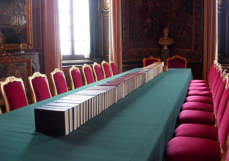 Konseljsalen